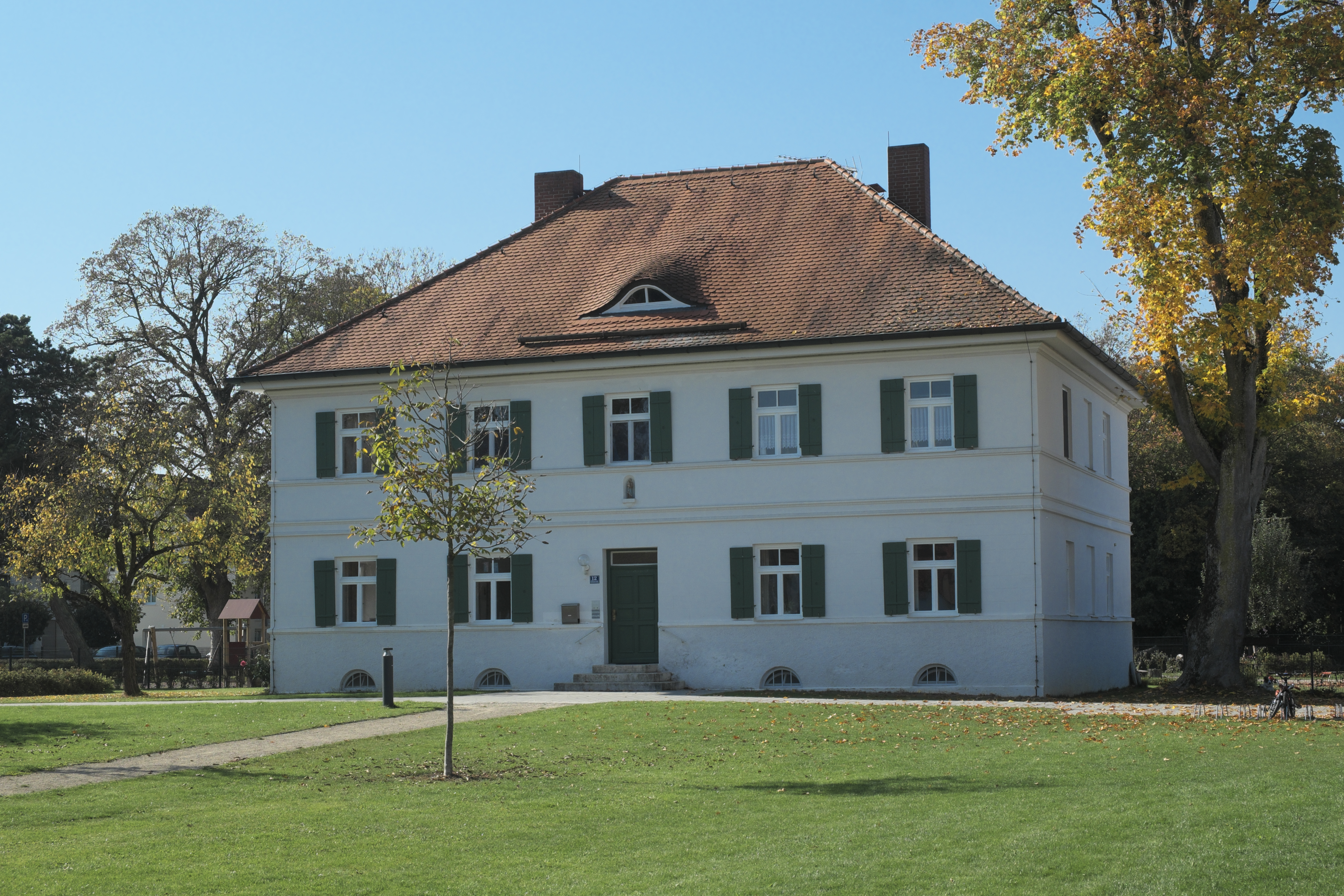 Pfarrhaus in Vierkirchen im Landkreis Dachau (Bayern/Deutschland)